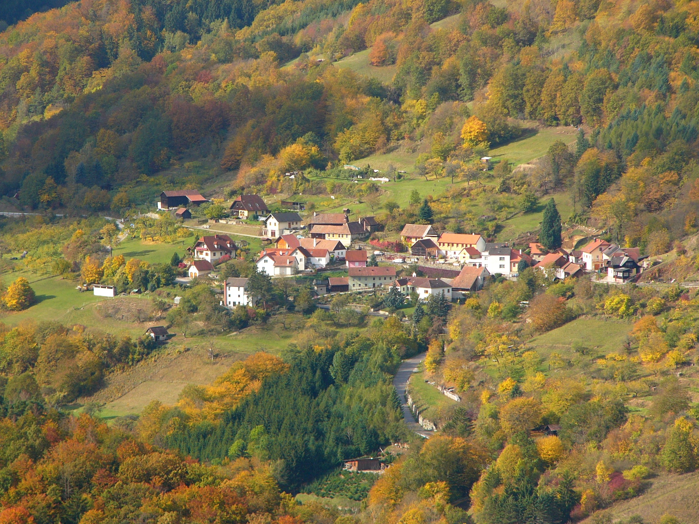 Blick auf Köfering von der Ruine Aggstein aus.